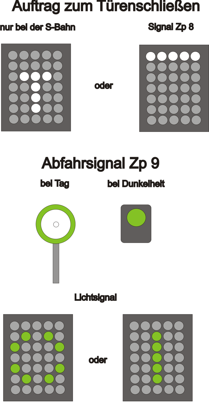 Abfahrauftrag mit dem Abfahrsignal Zp 9